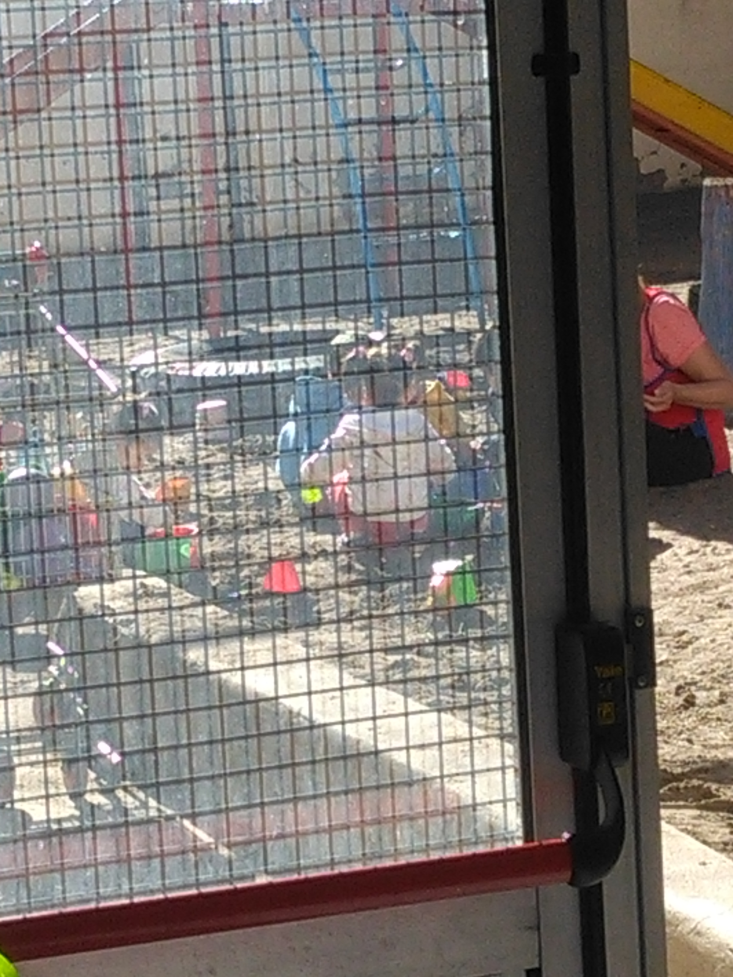 Exploración mediante el juego